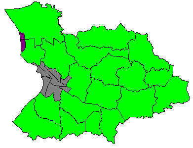 Comunidad El Maní, ubicada en el Barrio Mayagüez Arriba de Mayagüez, Puerto Rico.